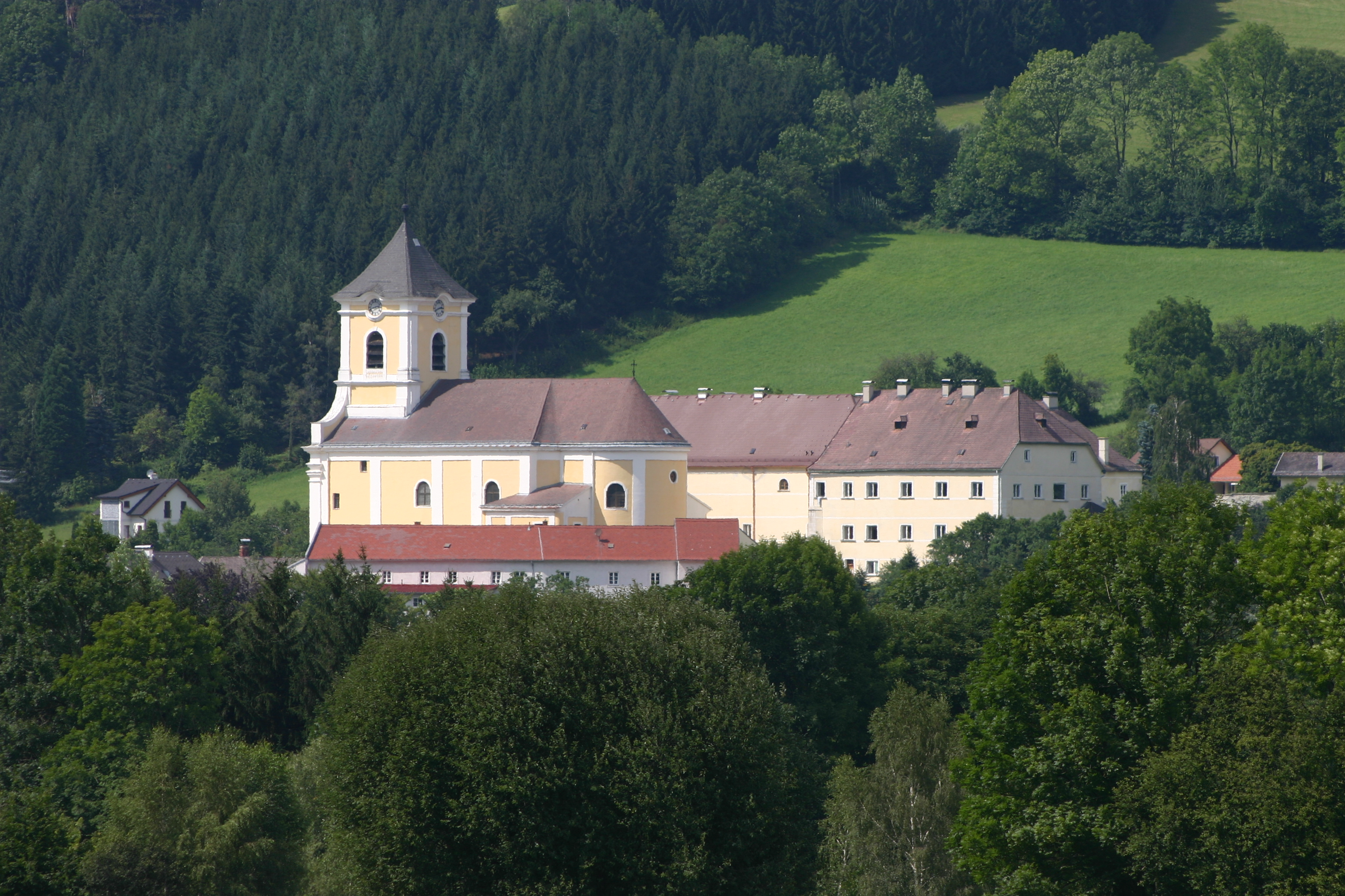 Kirchberg am Wechsel Pfarrkirche Sankt Jakob und Dominikanerinnen-Kloster